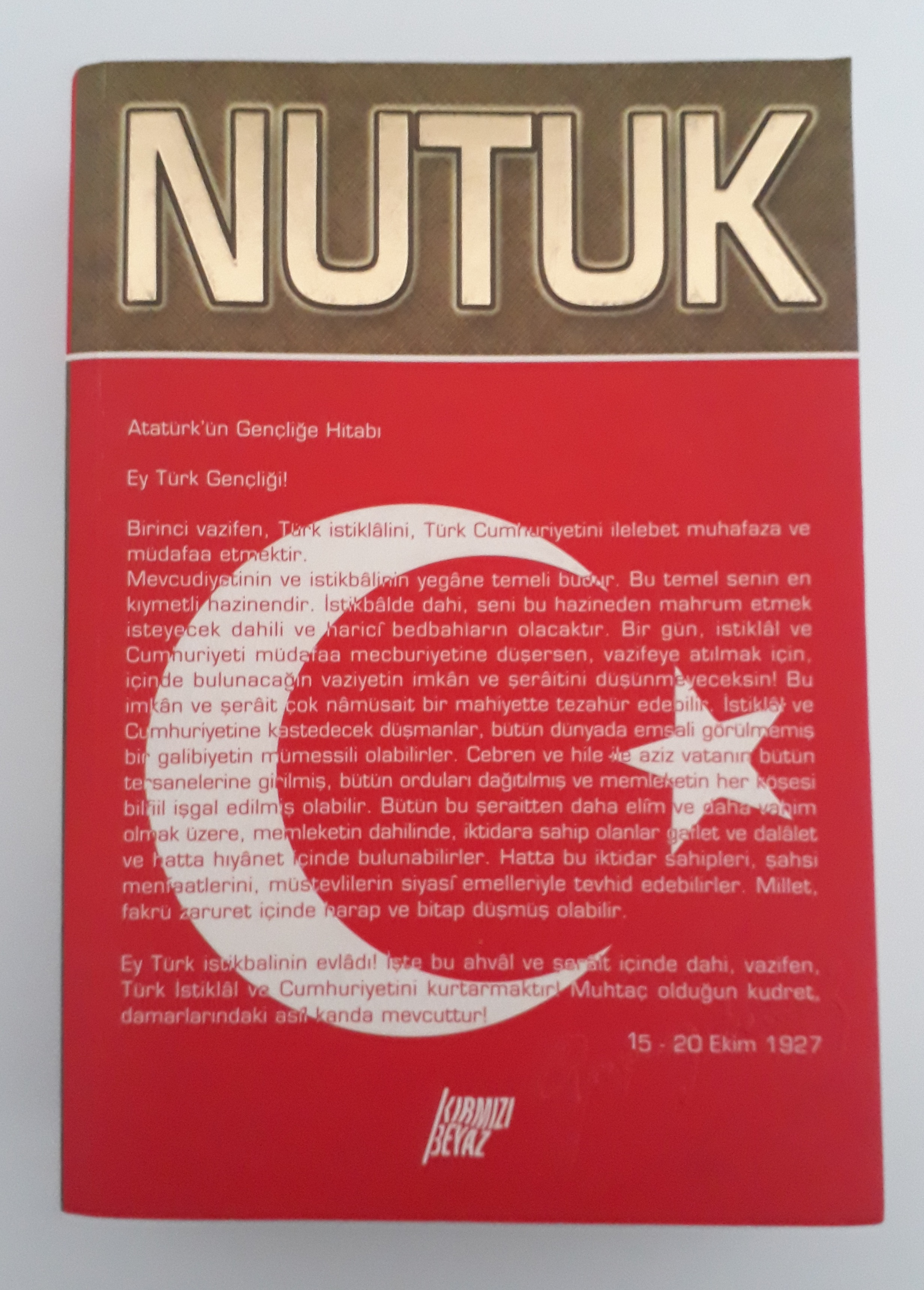 Gazi Mustafa Kemal Atatürk'ün başyapıtı olarak ve yakın Türkiye tarihi hakkında önemli bilgiler verdiği kabul edilen "Nutuk" adlı otobiyografik kitabı.